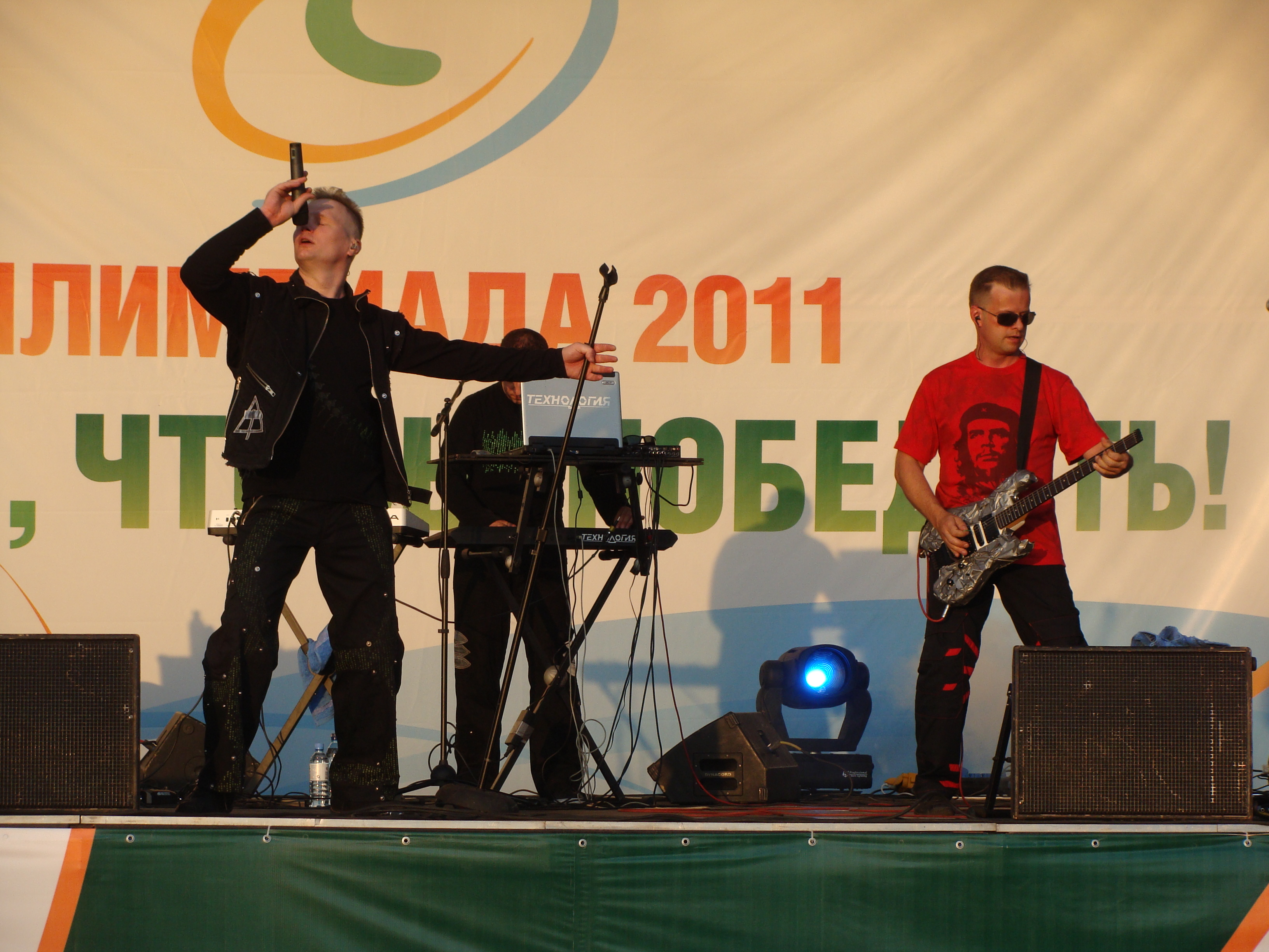 Группа Технология на Илимпиаде в Коряжме, 2011